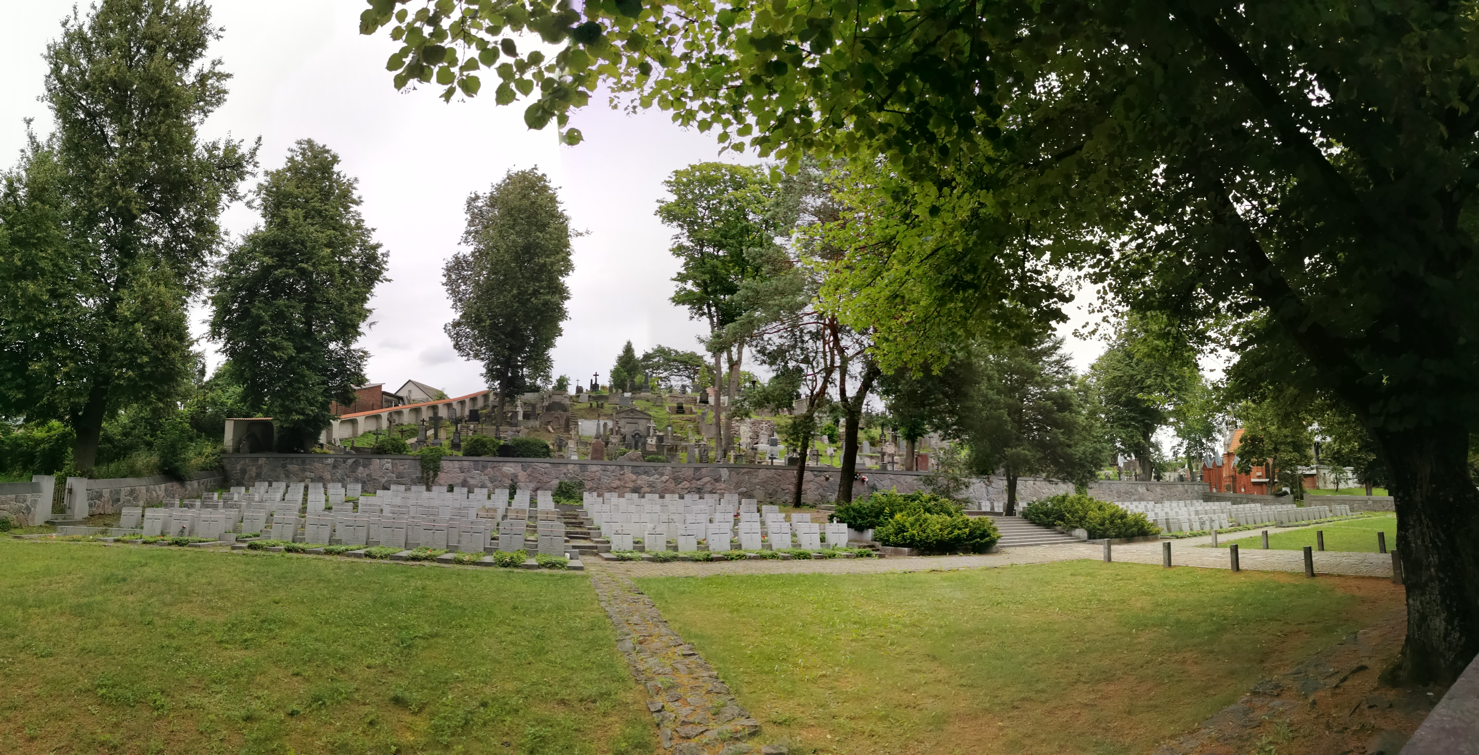 Rasų kapinių panorama